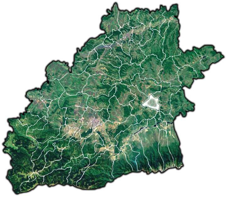 Marpod jud Sibiu